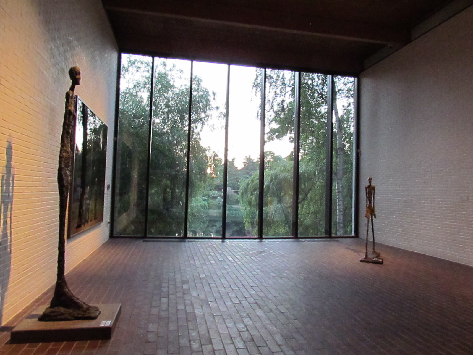 Louisiana Museum